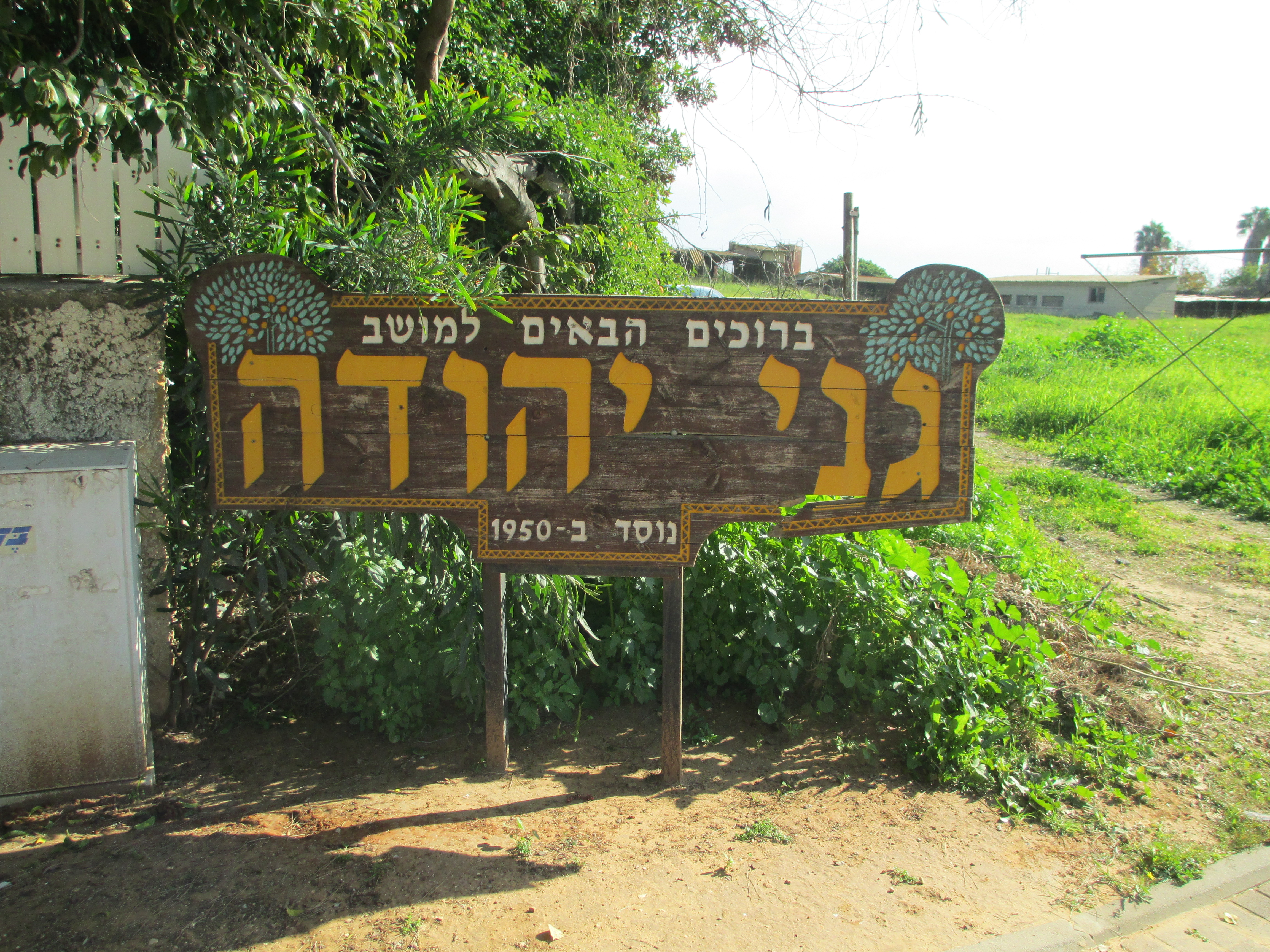 שלט בכניסה לגני יהודה